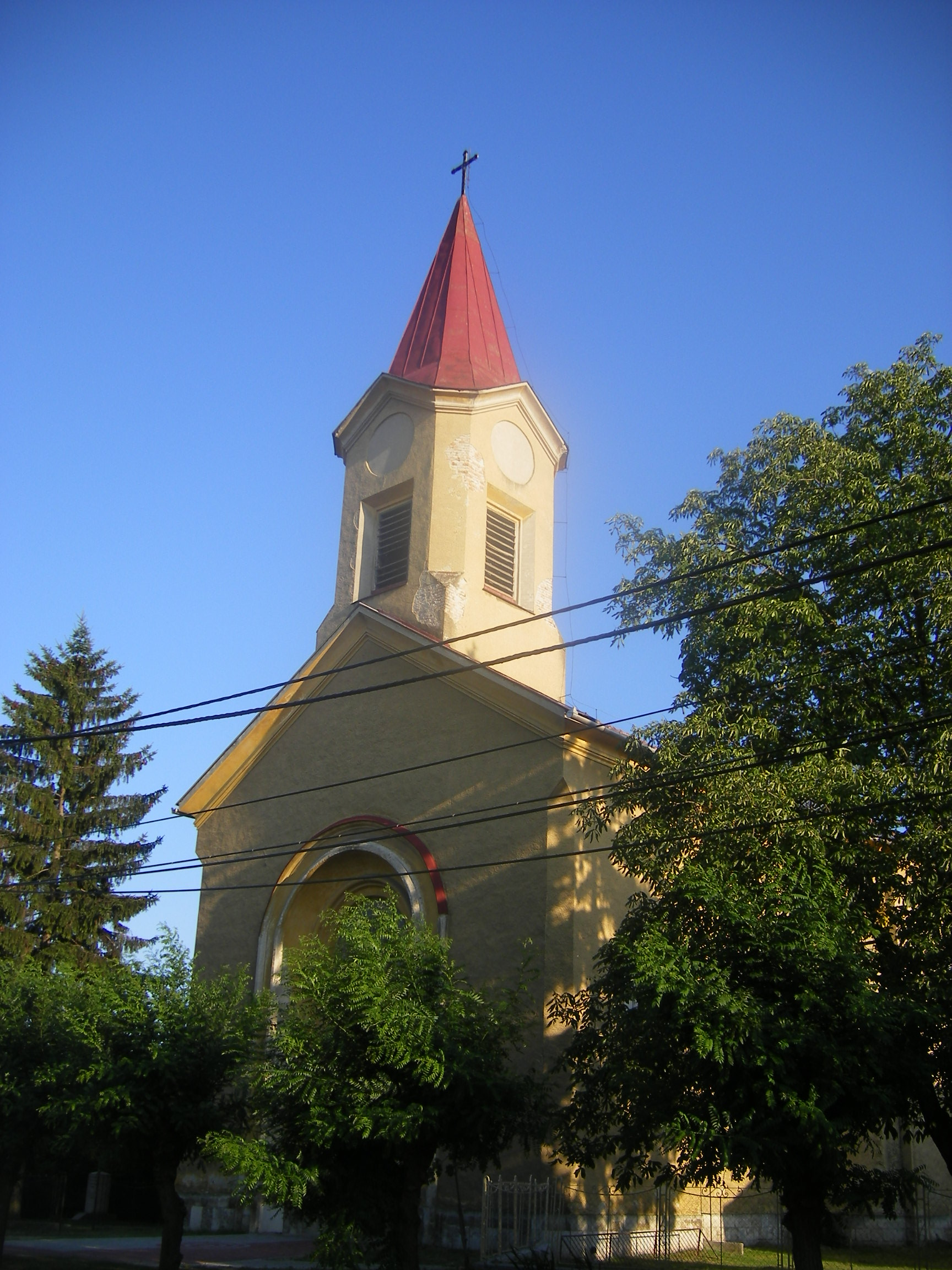 Ács - Szűz Mária római katolikus templom